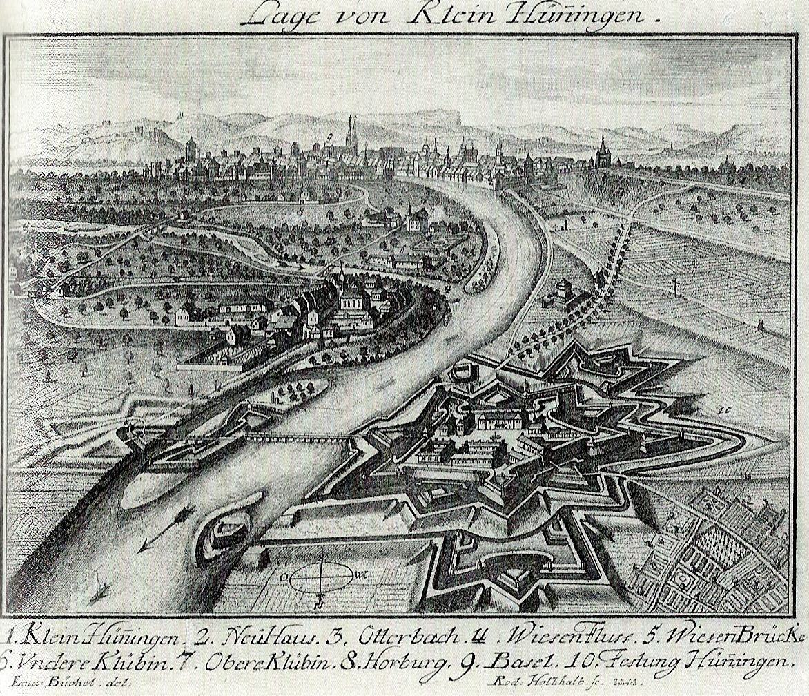 Lage von Klein Hüningen, Radierung nach einer Zeichnung von Emanuel Büchel (1705-1775). Vogelschaublick von Norden auf die Festung Hüningen (unten vorne rechts), den Rhein mit der Wiesemündung, das Dorf Kleinhüningen (Mitte) und die Stadt Basel (im Hintergrund).